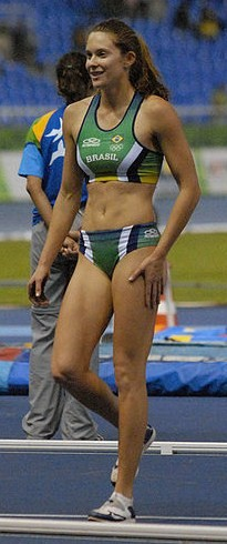 Rio de Janeiro - A paulista Fabiana Murer conquistou a medalha de ouro no salto com vara, ao elevar em 20 centrímetros o antigo recorde pan-americano de 4,40 metros